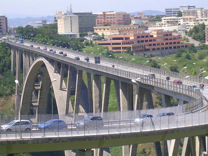 Altra prospettiva del Viadotto Bisantis dalla linea FC